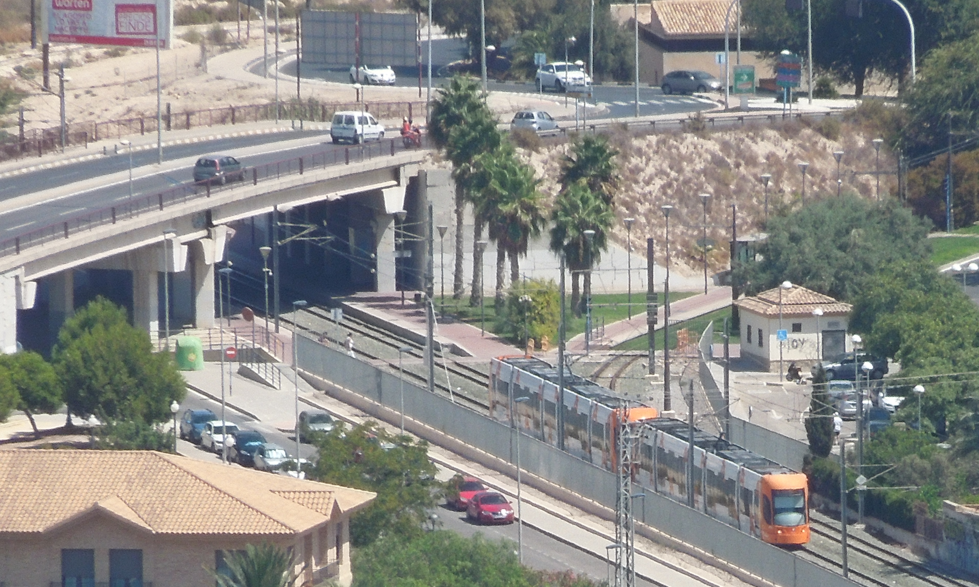 Apeadero de las lineas 1, 3 y 4.